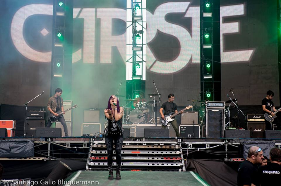 Cosquin Rock 2014